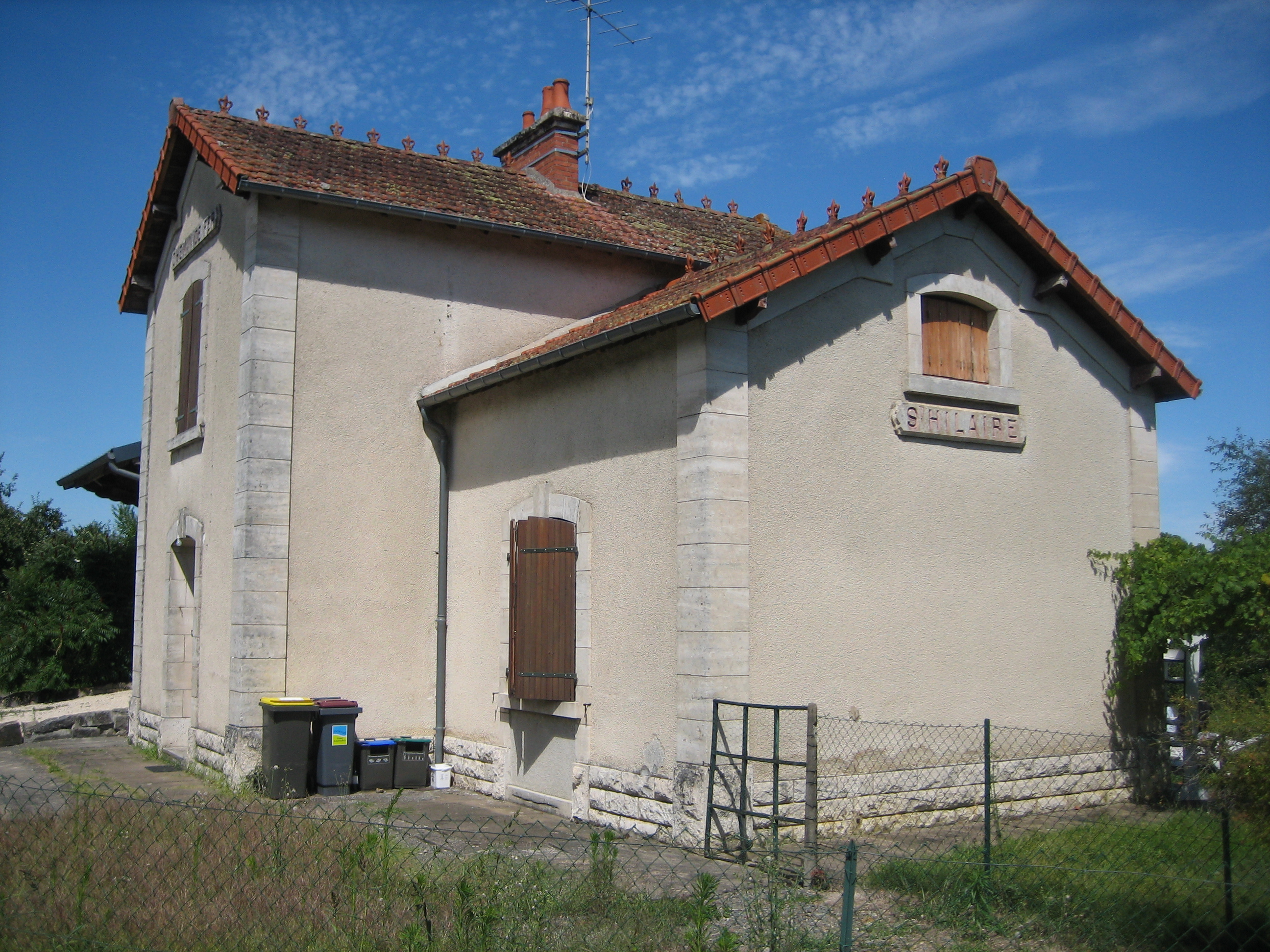 La gare désaffectée de Saint-Hilaire sur Lignières, sur la route de Lignières au Châtelet, à l'embranchement vers Touchay